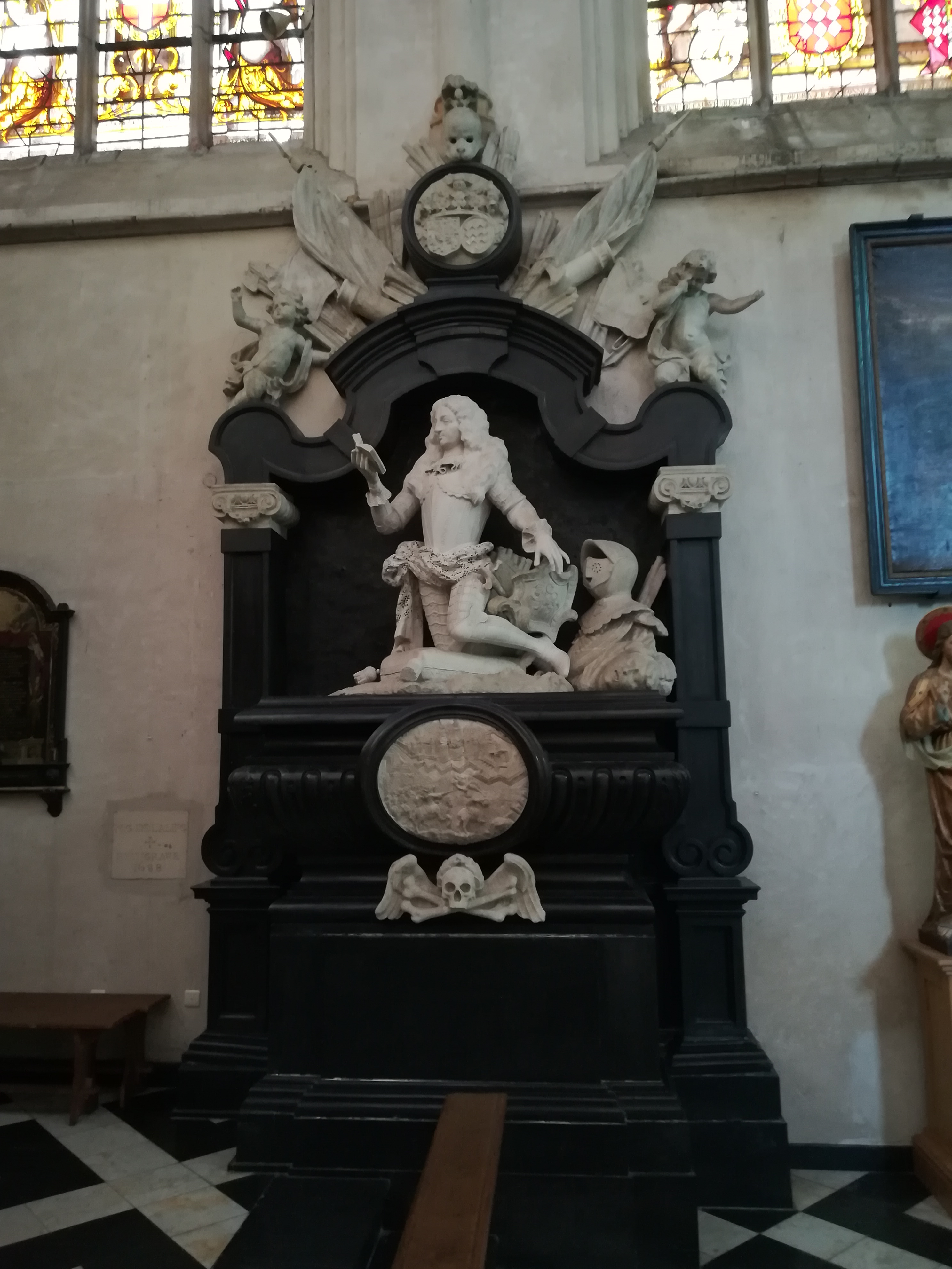 Kunstenaar Pieter Scheemaeckers - 1709